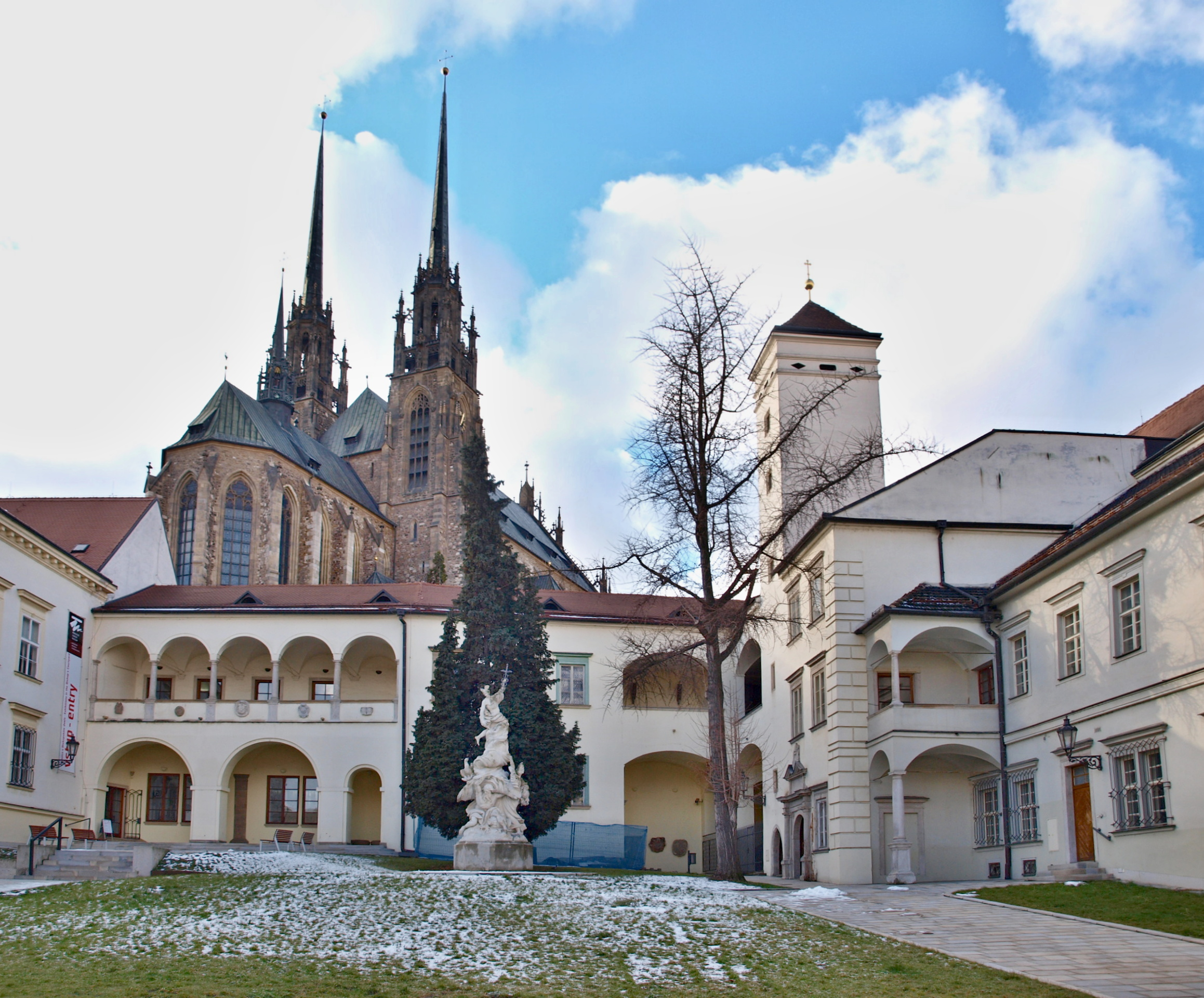 Biskupský dvůr (Brno)